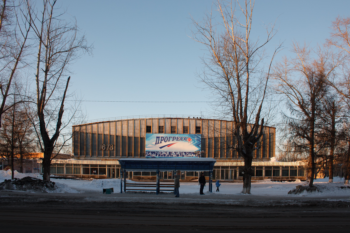 Ледовый.Глазов